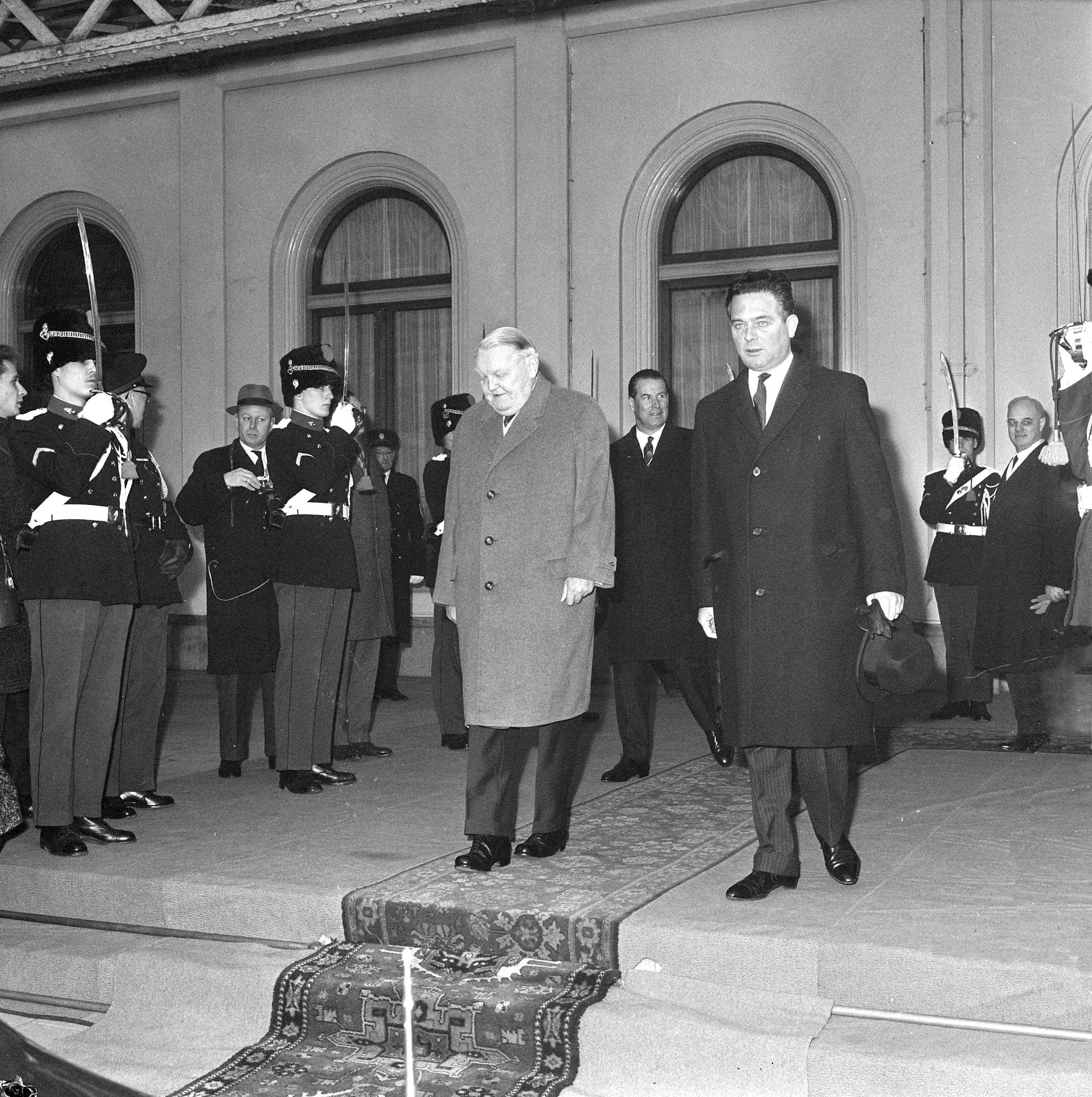 Bundeskanzler Ludwig Erhard in den Niederlanden. V.l.n.r.: Ludwig Erhard, Gerhard Schröder (im Hintergrund) und Victor Marijnen.